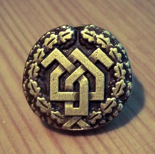 Беларуская (тарашкевіца): Эмблема "Белага Легіёна"